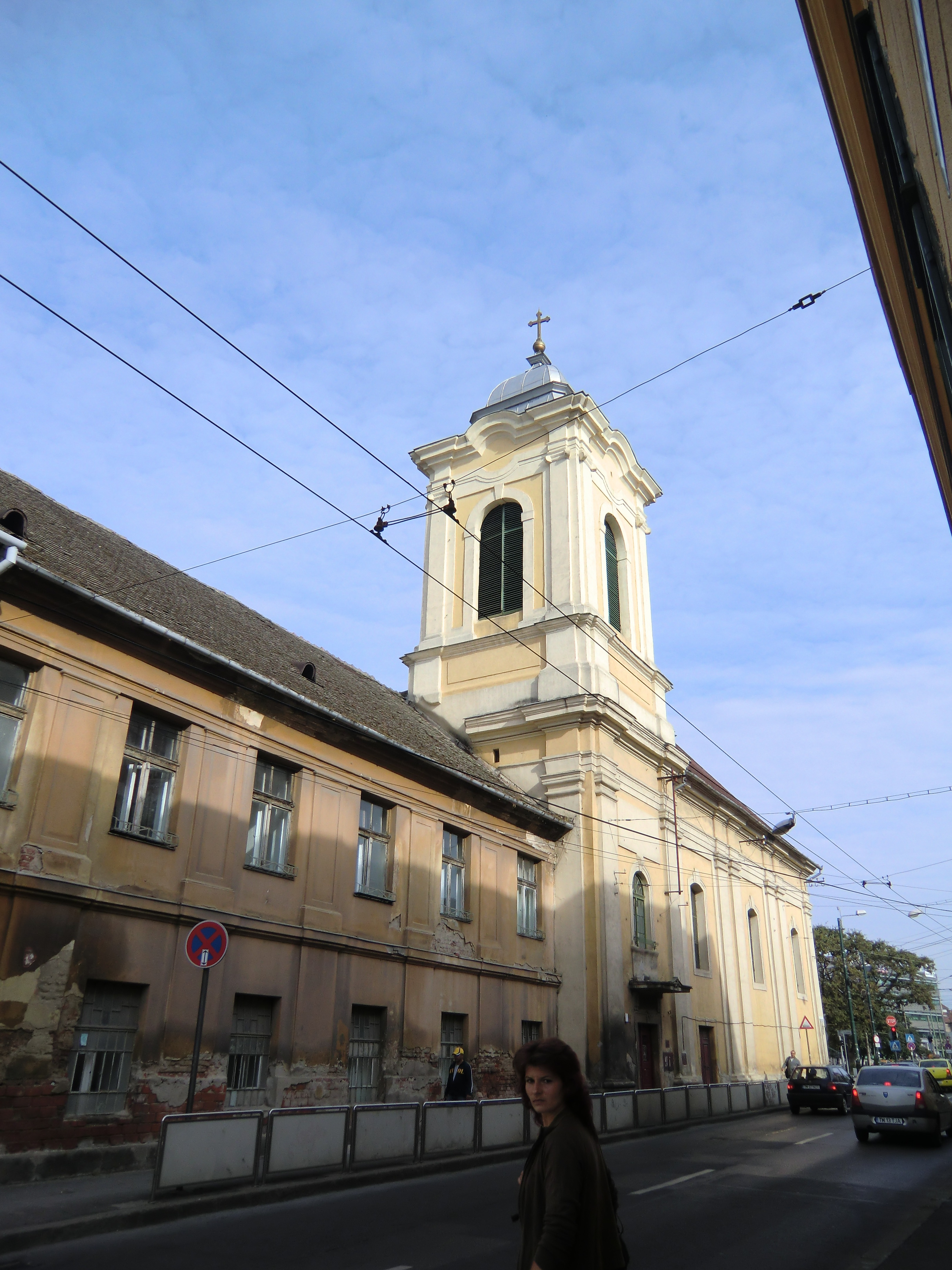 Die Augenklinik in Timișoara 02